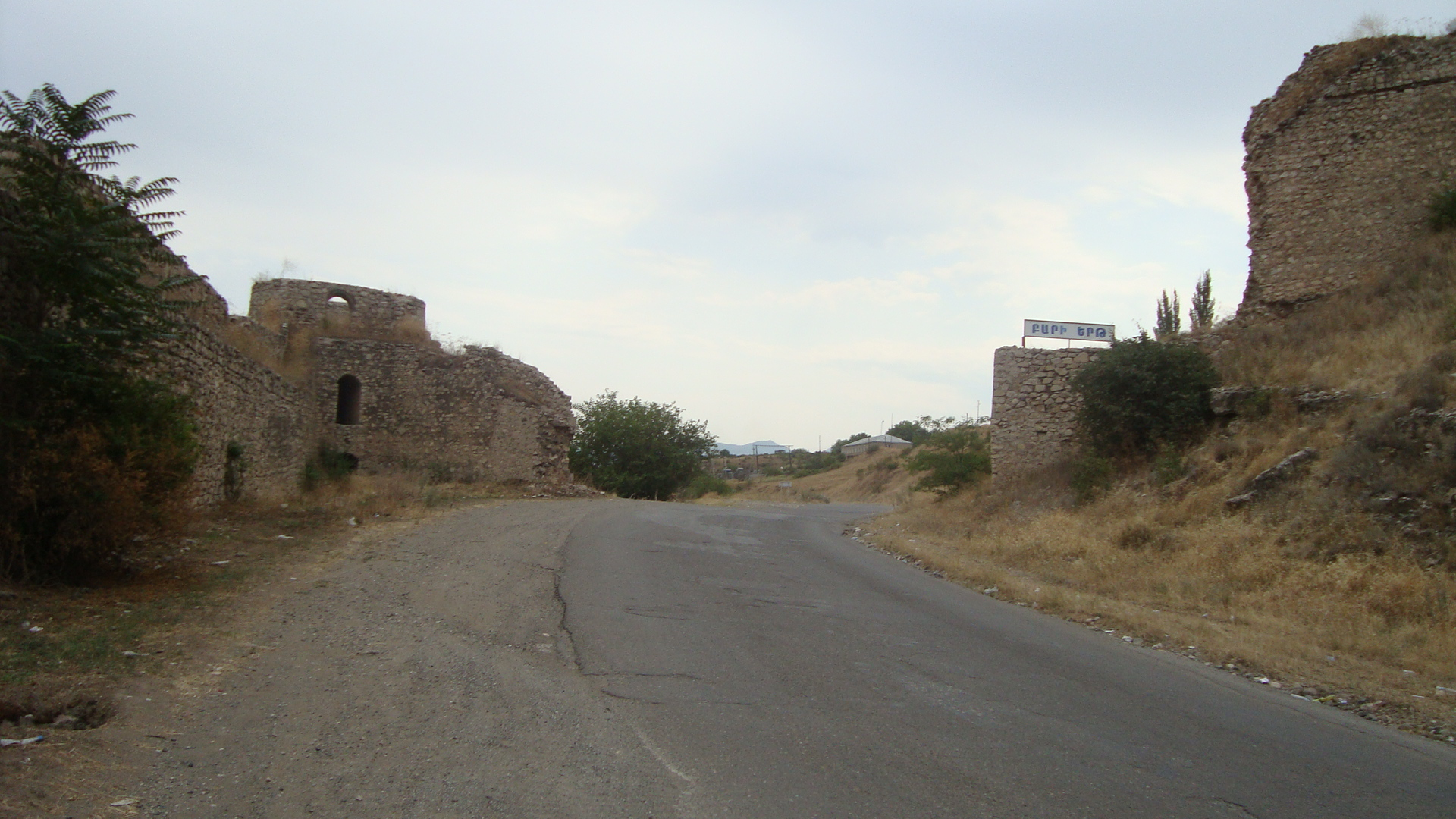 Askeran fortress. Askeran, Azerbaijan / Republic of Mountainous Karabakh (Artsakh).